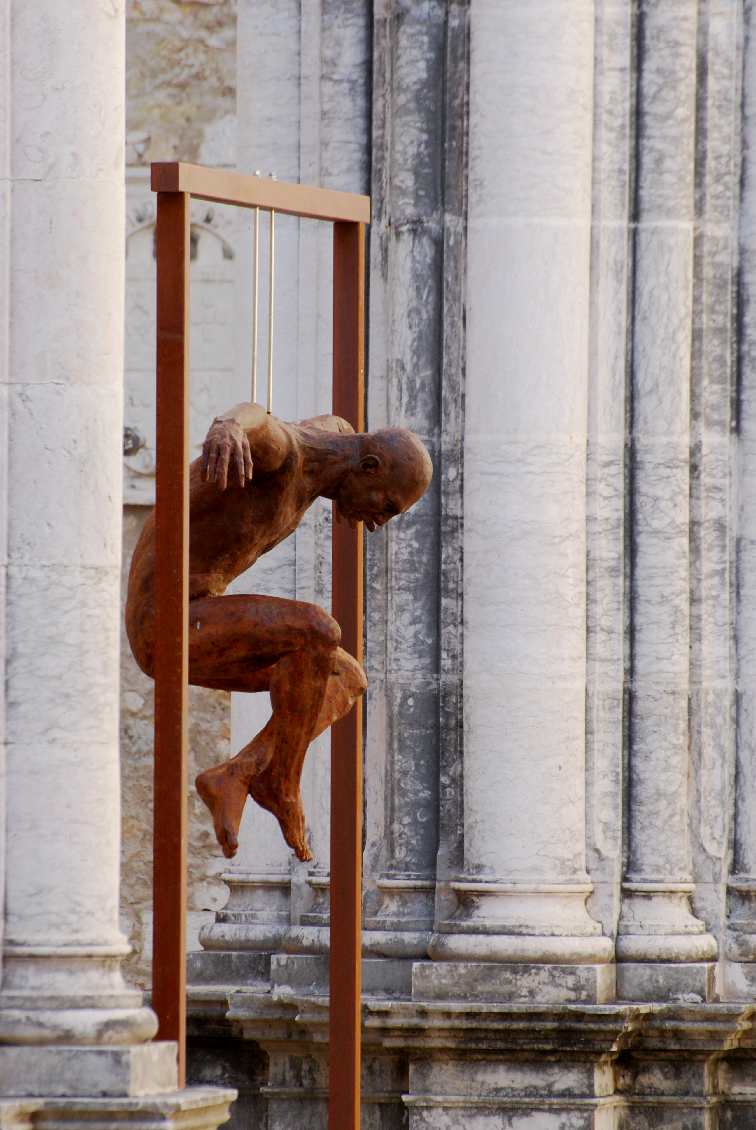 Escultura